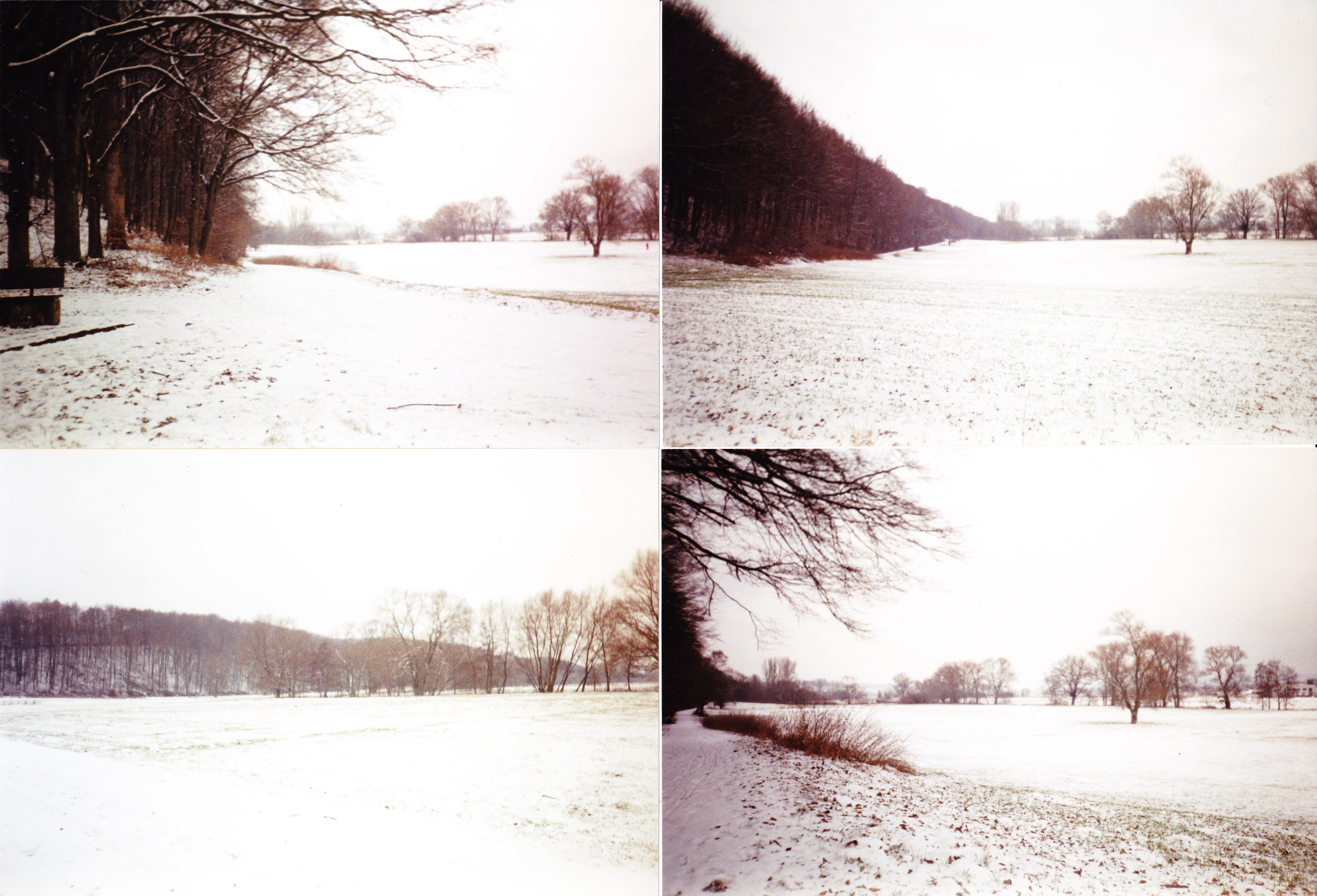 Der Hopfenberg bei Lindau im Eichsfeld im Januar 2004.